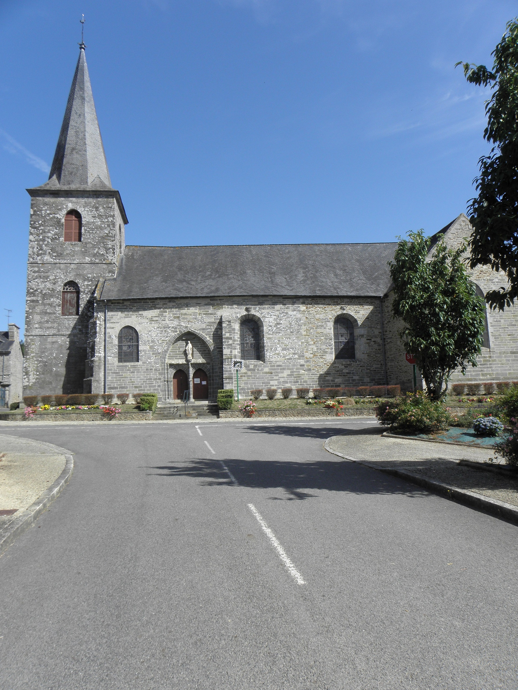 Église Notre-Dame de La Ferrière (22). Vue méridionale.